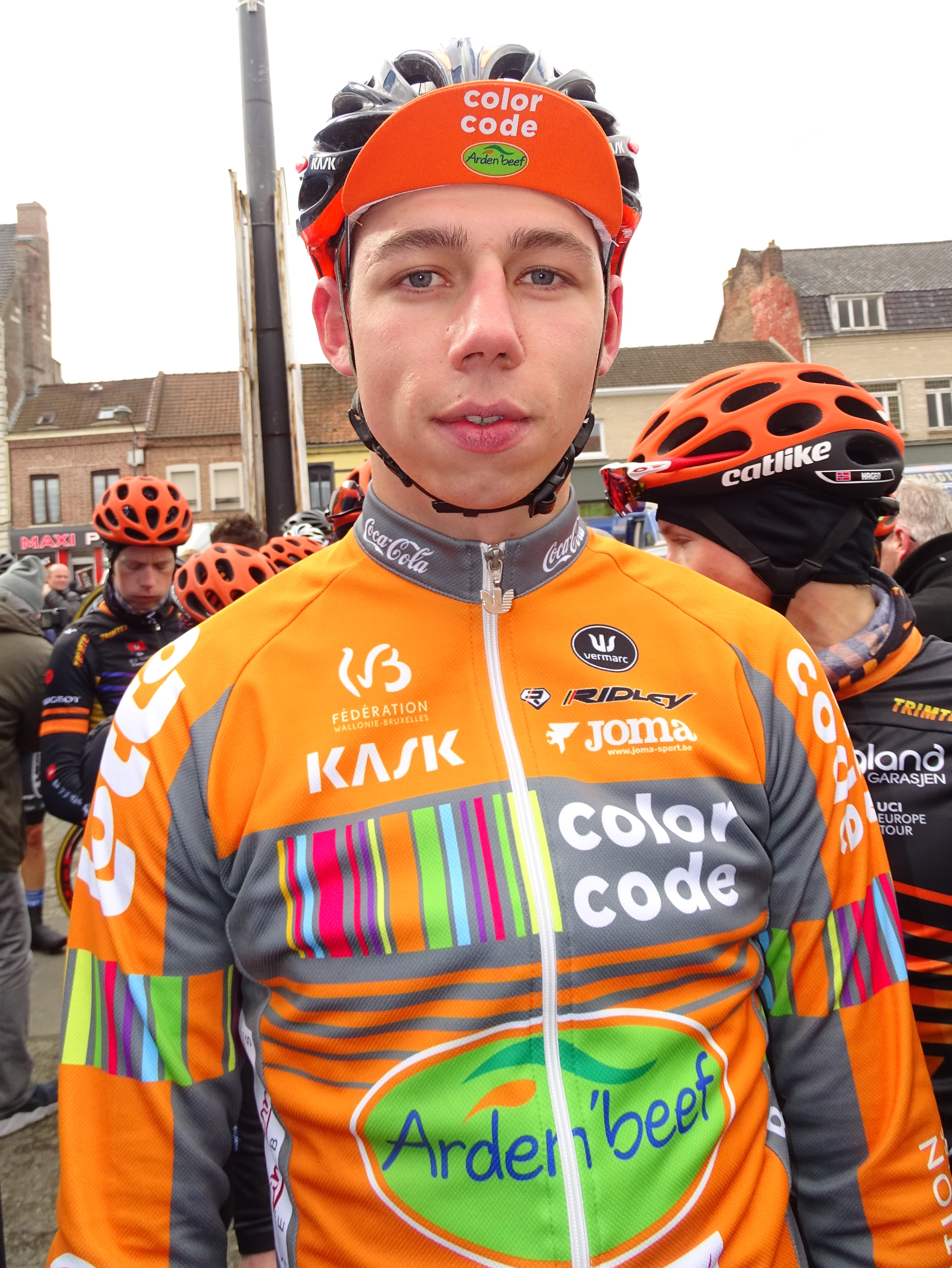 Reportage réalisé le dimanche 6 mars à l'occasion du départ et de l'arrivée du Grand Prix de Lillers-Souvenir Bruno Comini 2016 à Lillers, Pas-de-Calais, Nord-Pas-de-Calais, France.